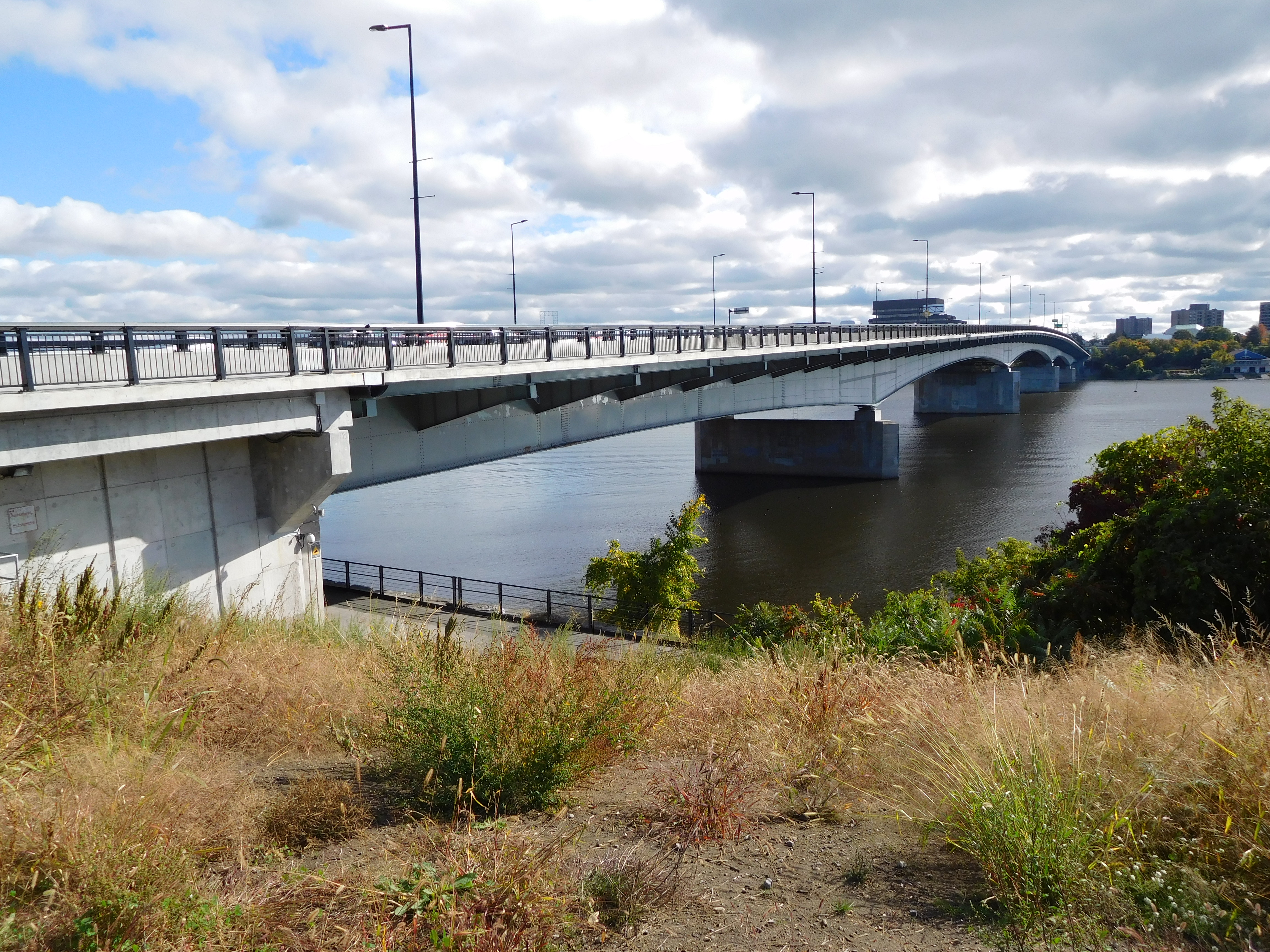 Pont Macdonald-Cartier, vu du parc Jacques-Cartier, Gatineau